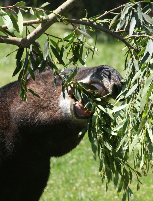 Mountain Tapir